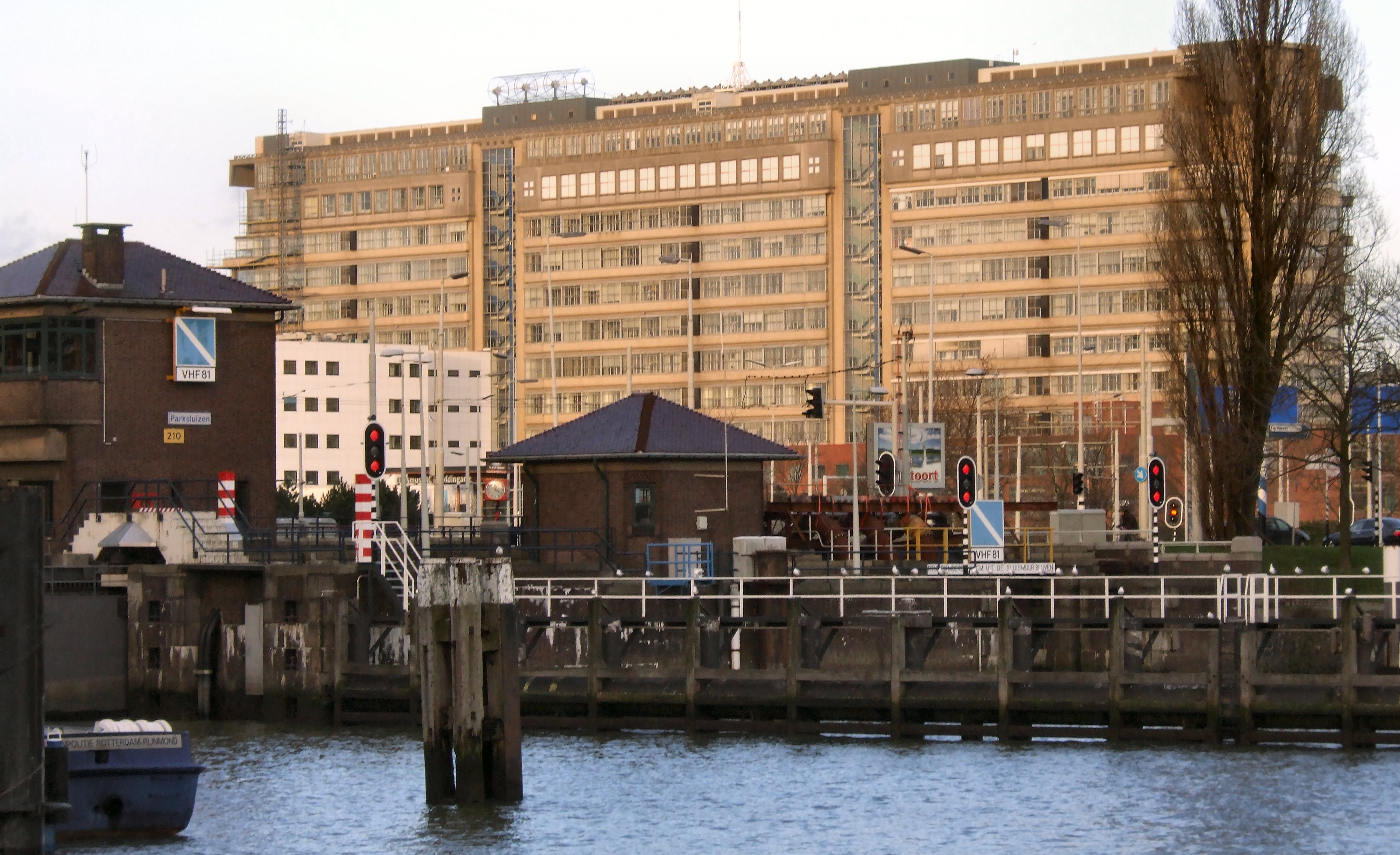 Dijkzigtziekenhuis in Rotterdam, 14 januari 2007 Licensing Categorie:Afbeelding bouwwerk Rotterdam